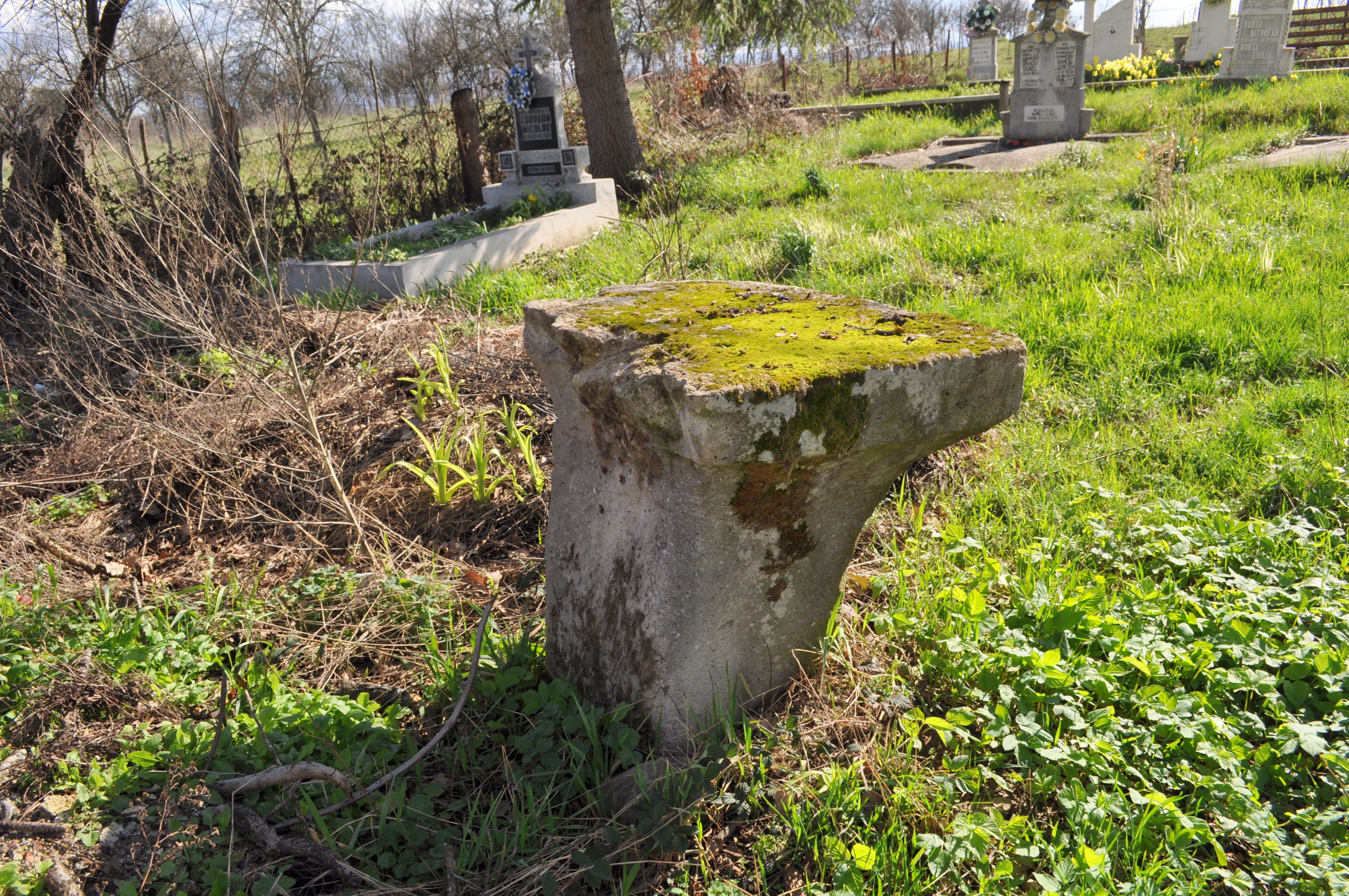 Biserica „Sf. Nicolae", sat DOBROŢ; comuna TOMEŞTI